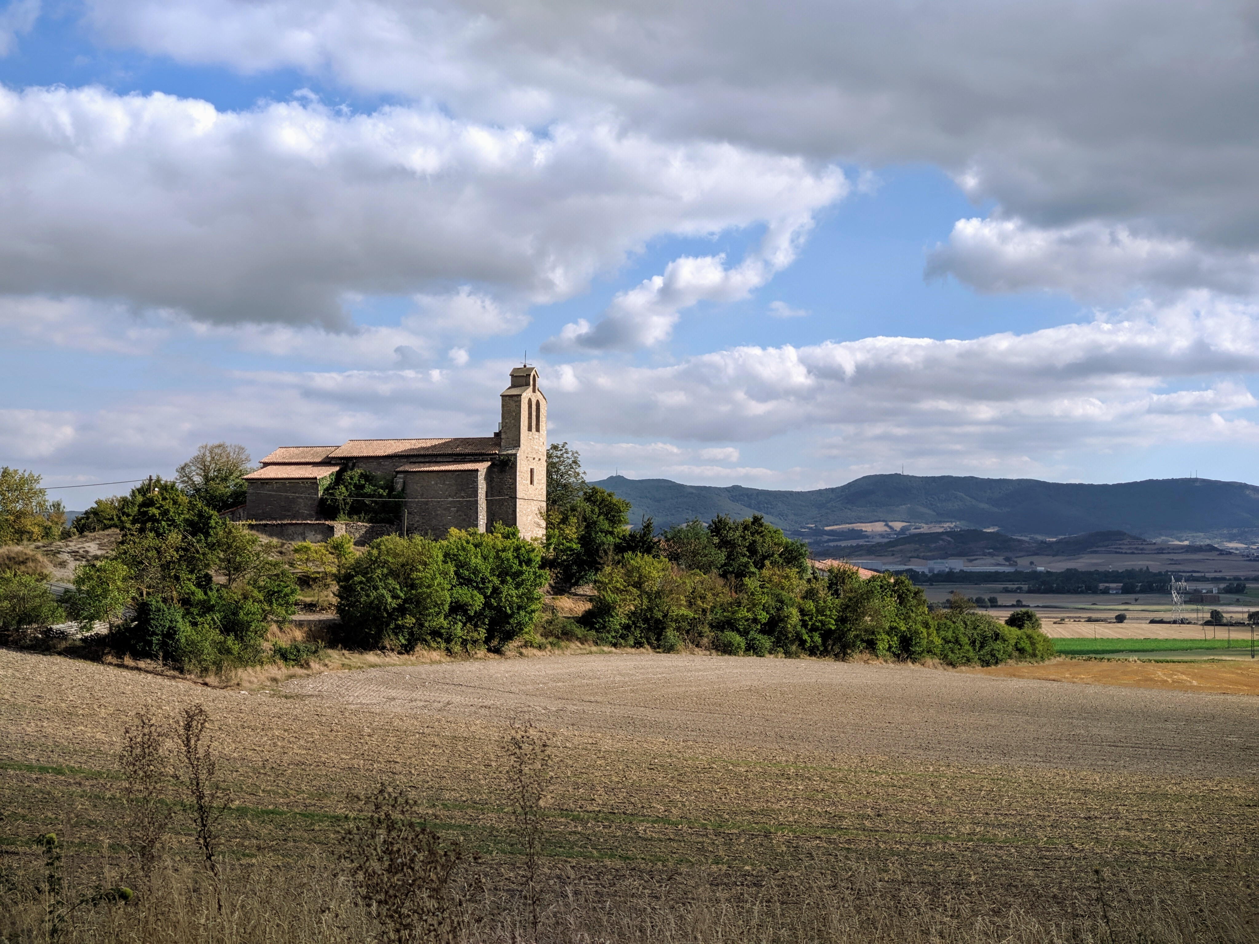 La Iglesia de La Asunción de Nuestra Señora desde el centro de Ullíbarri-Viña.